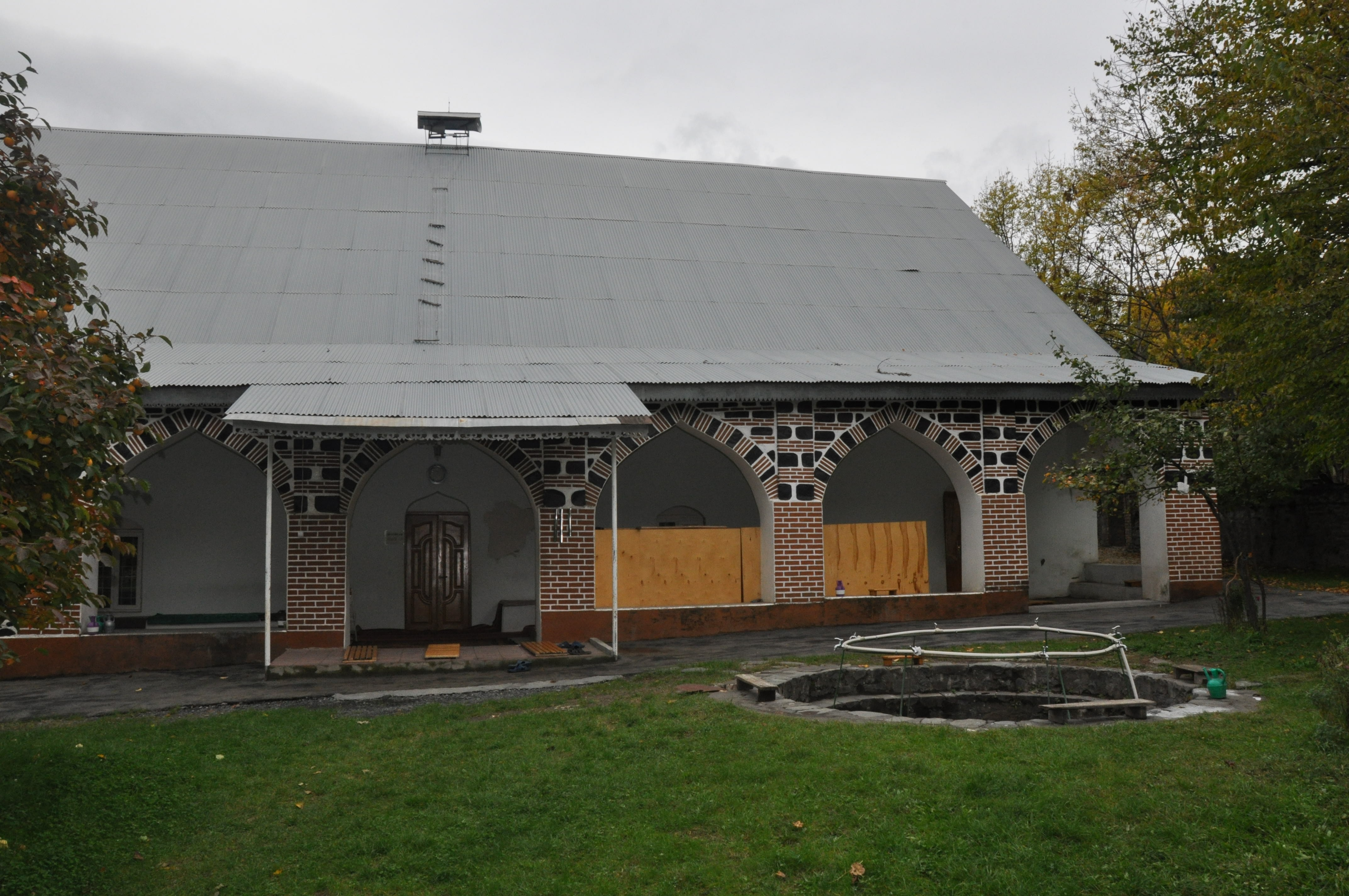 Джума Мечеть в Джаре